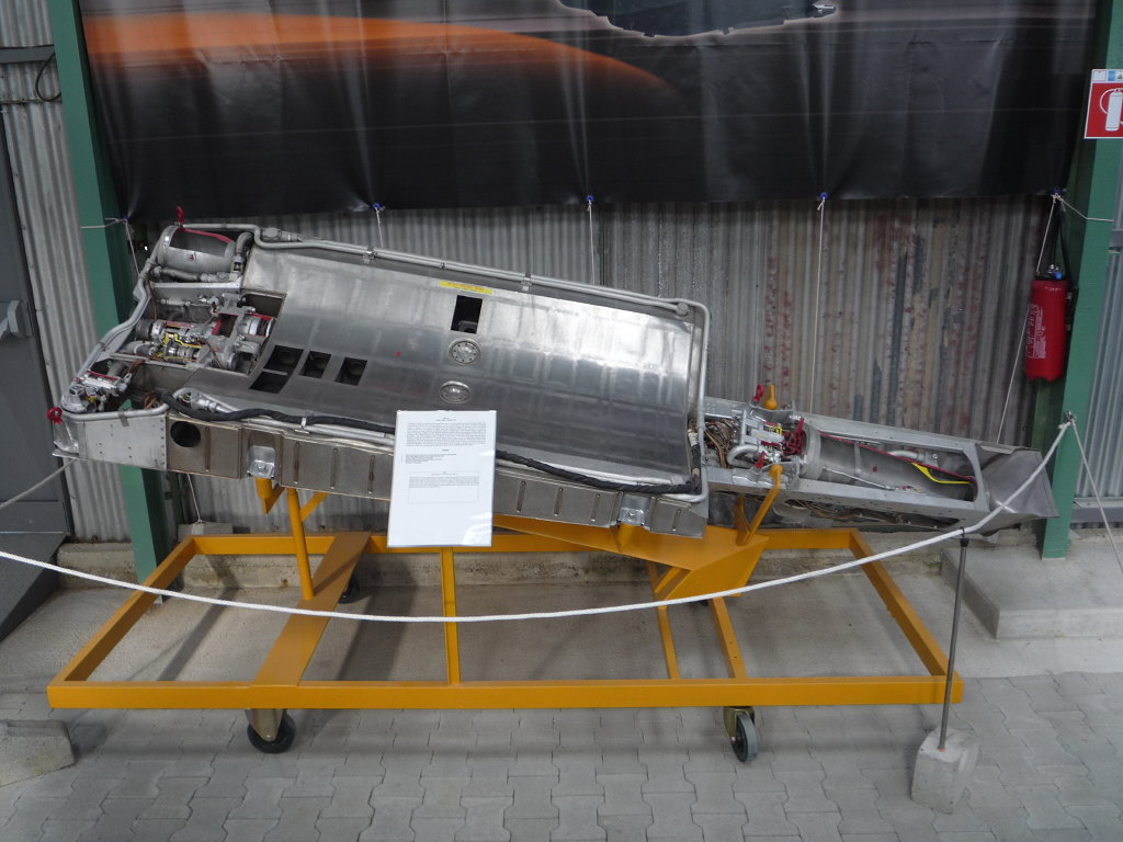 Moteur fusée SEPR 841 du Mirage IIIC